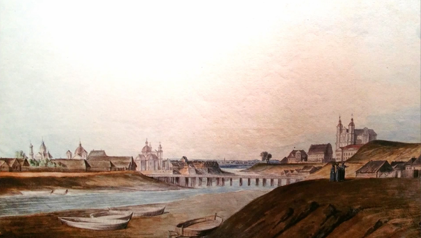 Беларуская (тарашкевіца): Віцебск (Viciebsk), сутока Віцьбы і Дзьвіны (Dźvina)